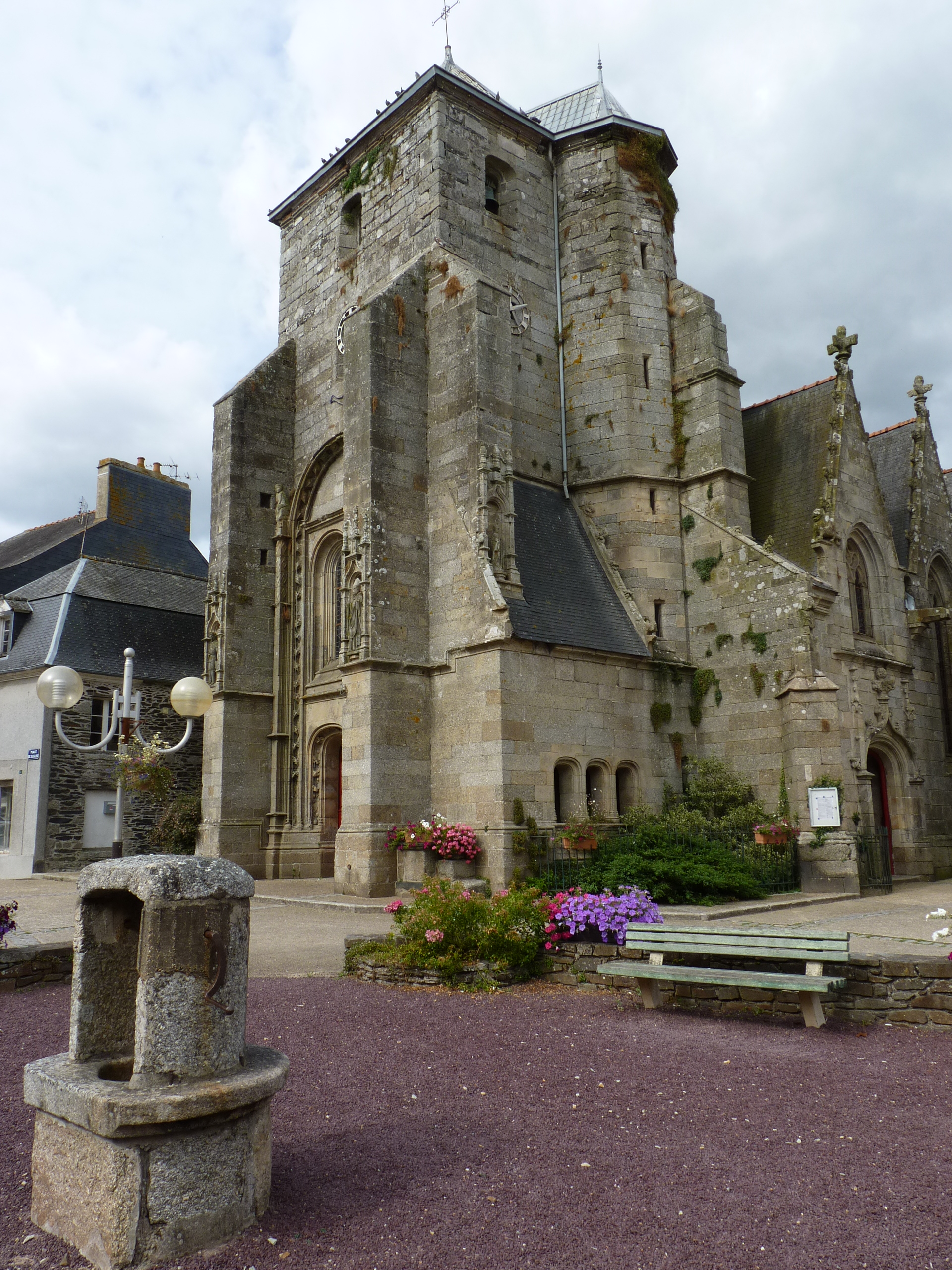 Eglise des 15ème et 16ème siècle